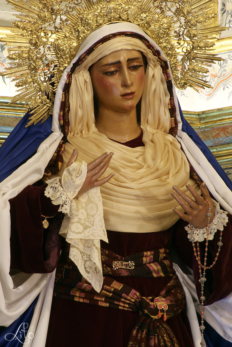 Fotografia realizada por Manuel Francisco Álvarez Ruiz.